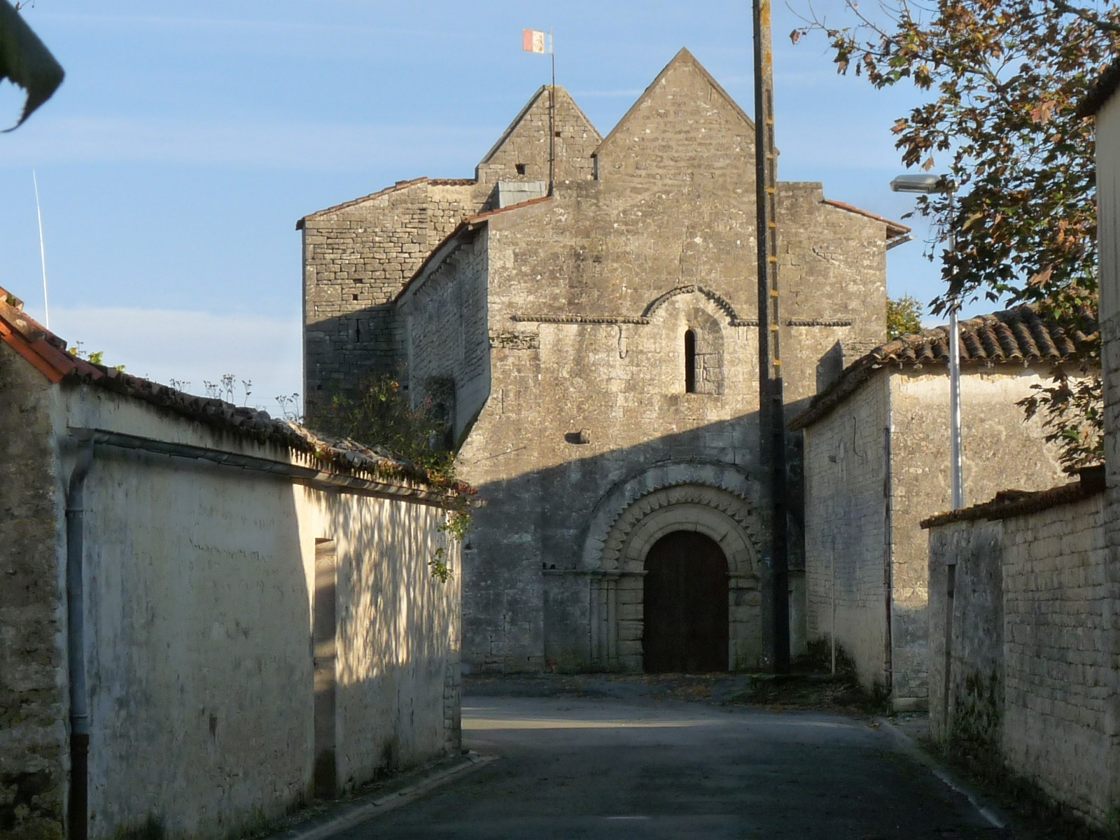 Eglise de Louzignac, Charente-Maritime, France